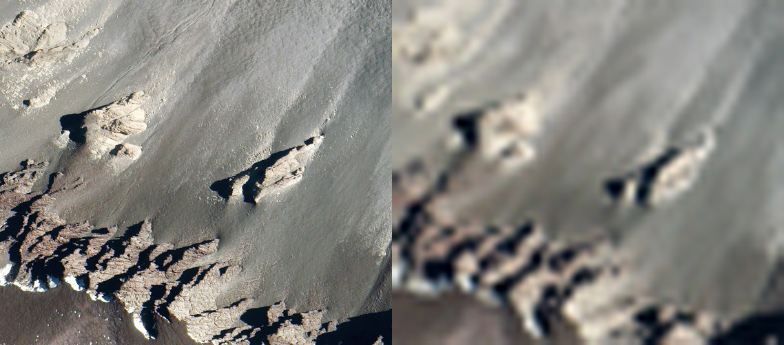 Űrfelvétel az Antarktiszról, a bal oldalon 2 méteres a felbontás, a jobb oldalon 200 méteres.